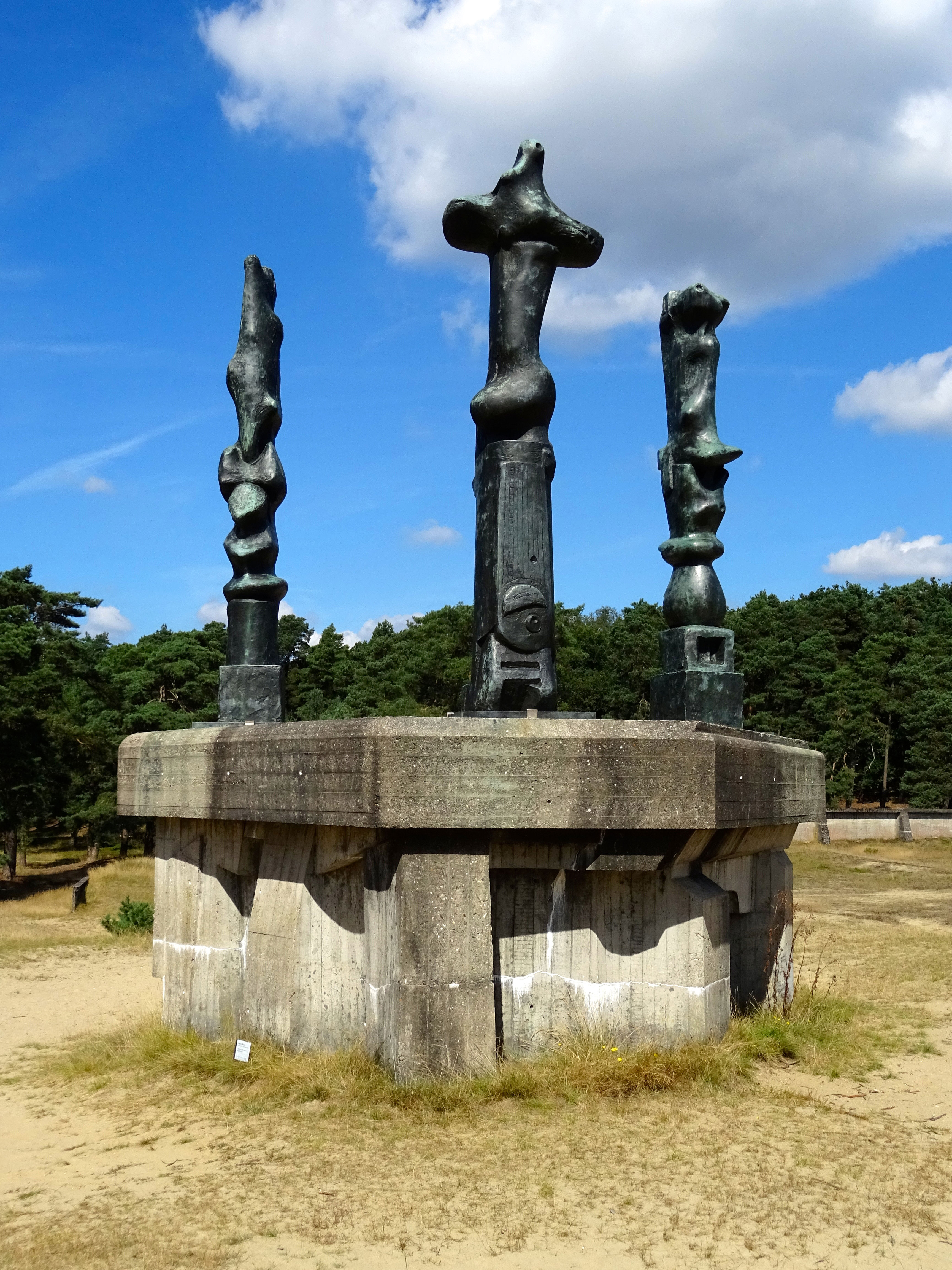 Drie staande motieven door Henry Moore, Hoge Veluwe